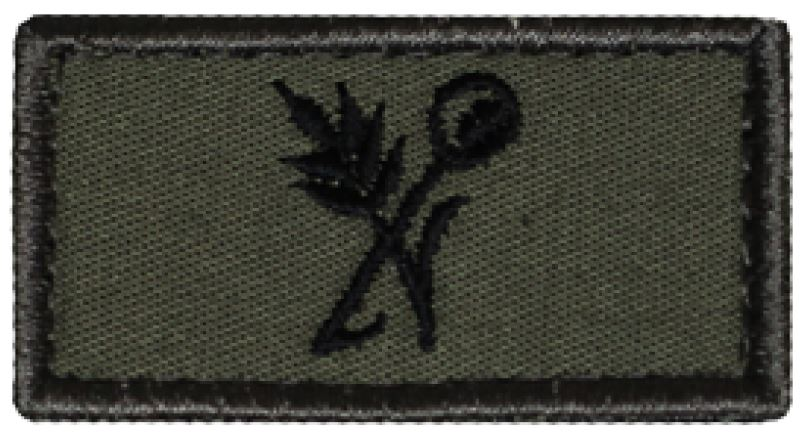 Koch Abzeichen